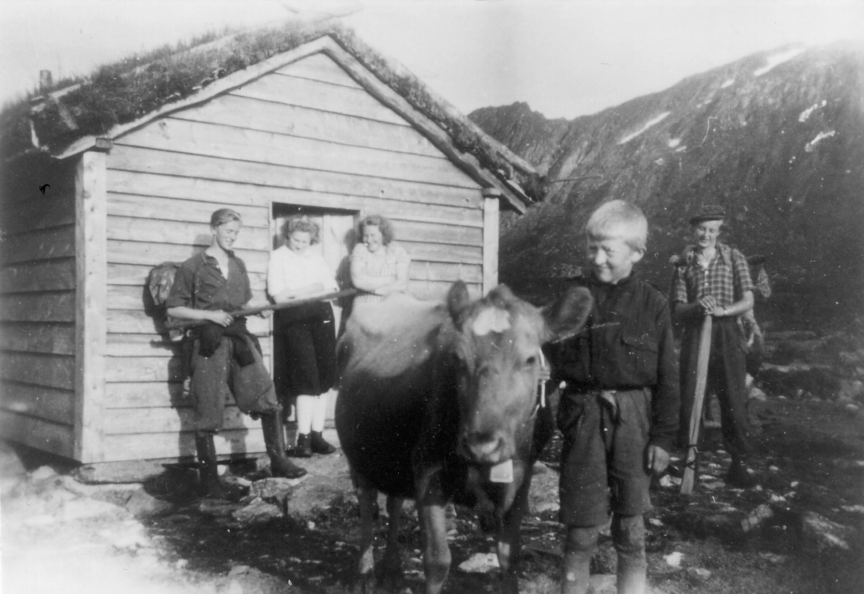 Høydalsstølen 1945